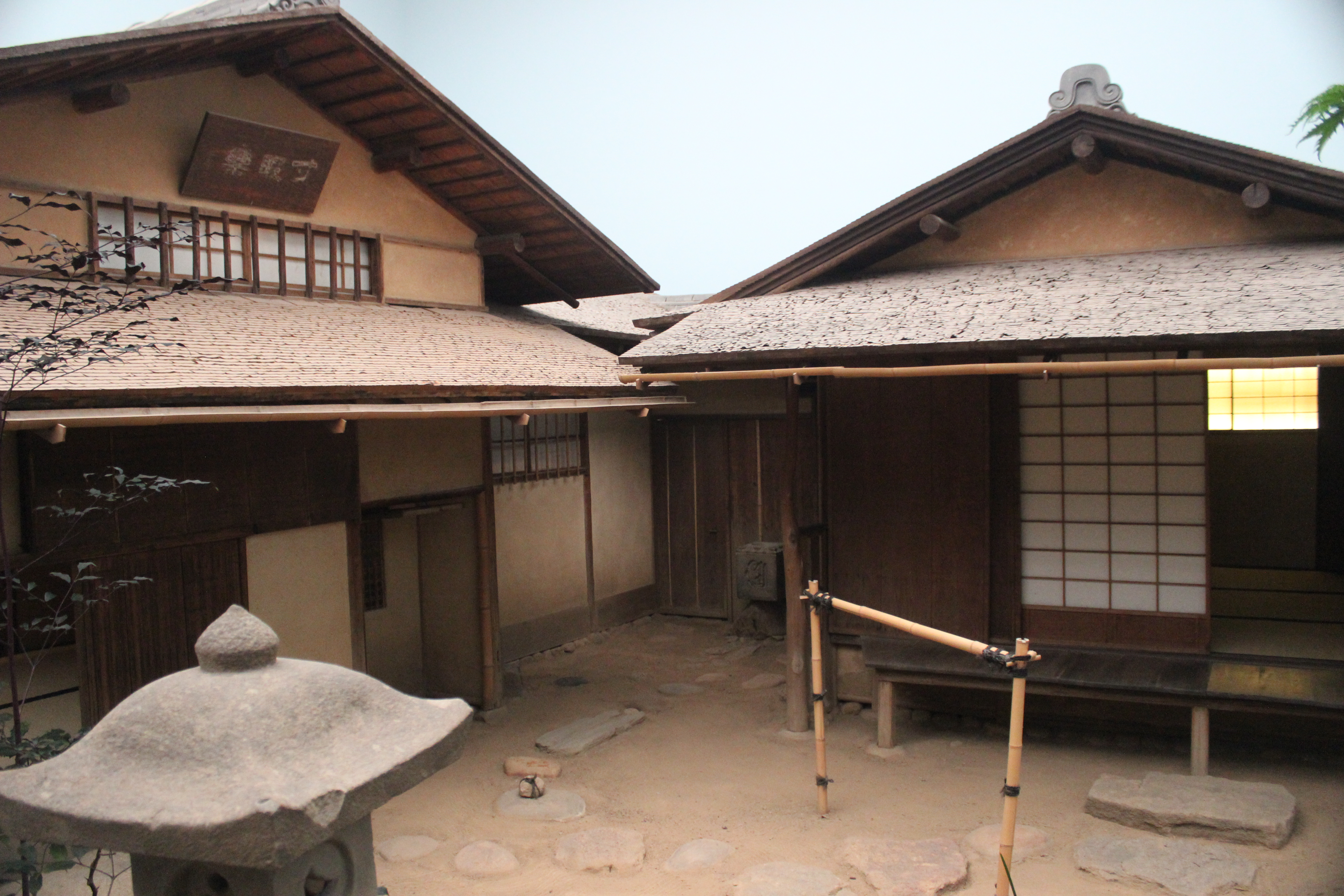 Philadelphia Museum of Art. Casa de té Sunkaraku (alegrías evanescentes).